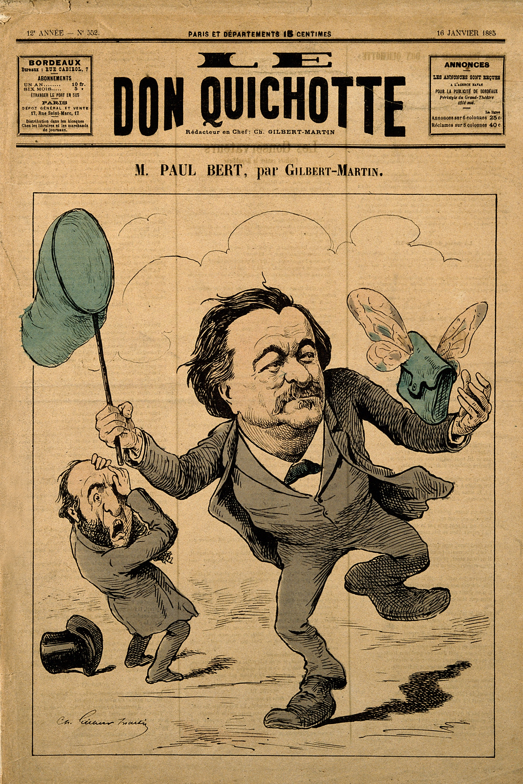 Genre/Technique: Portrait prints. Lithographs. Subject name: Bert, Paul, 1833-1886